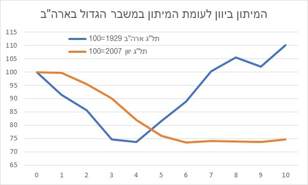 Comparison between the Great depression in the US (1929 GDP=100) and the recession in Greece (2008 GDP = 100). Data: US - ; Greece - IMF